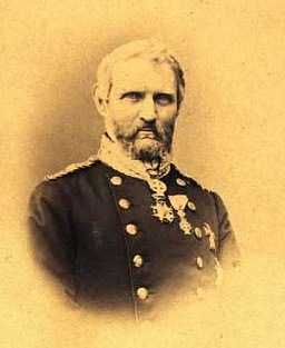 Frederik Carl Vilhelm Caroc (1811-1882), Danish general